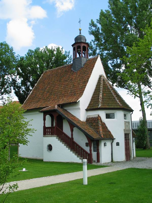 Ansicht der Alt-Katholischen Kirche St. Nikolaus am Rosengarten in Coburg